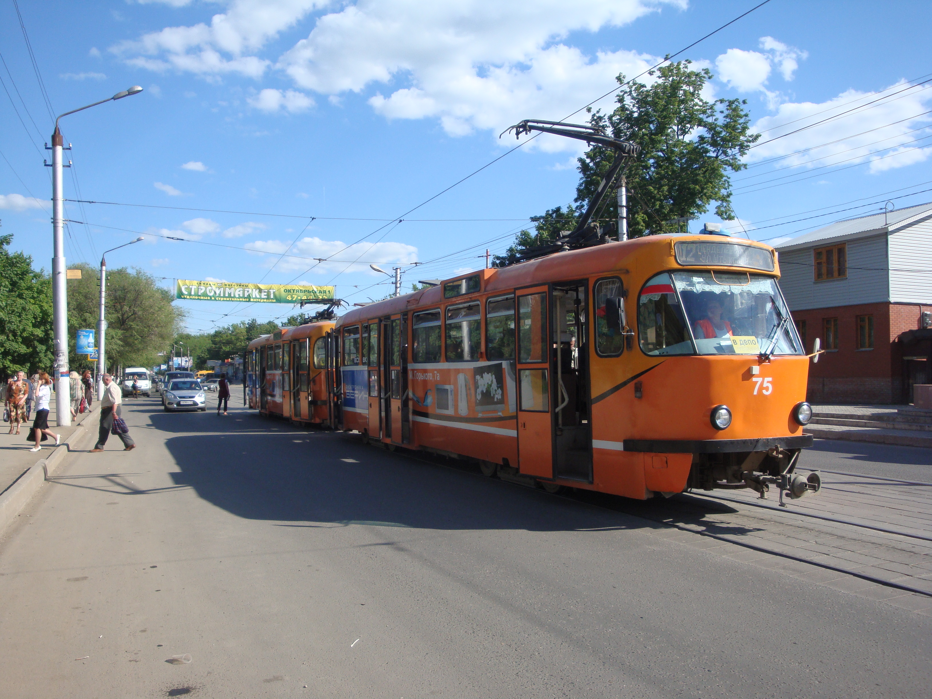 Трамвай Татра T3DC на улице Оборонной в Туле.